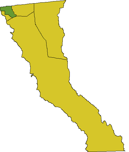 Locación de Baja California